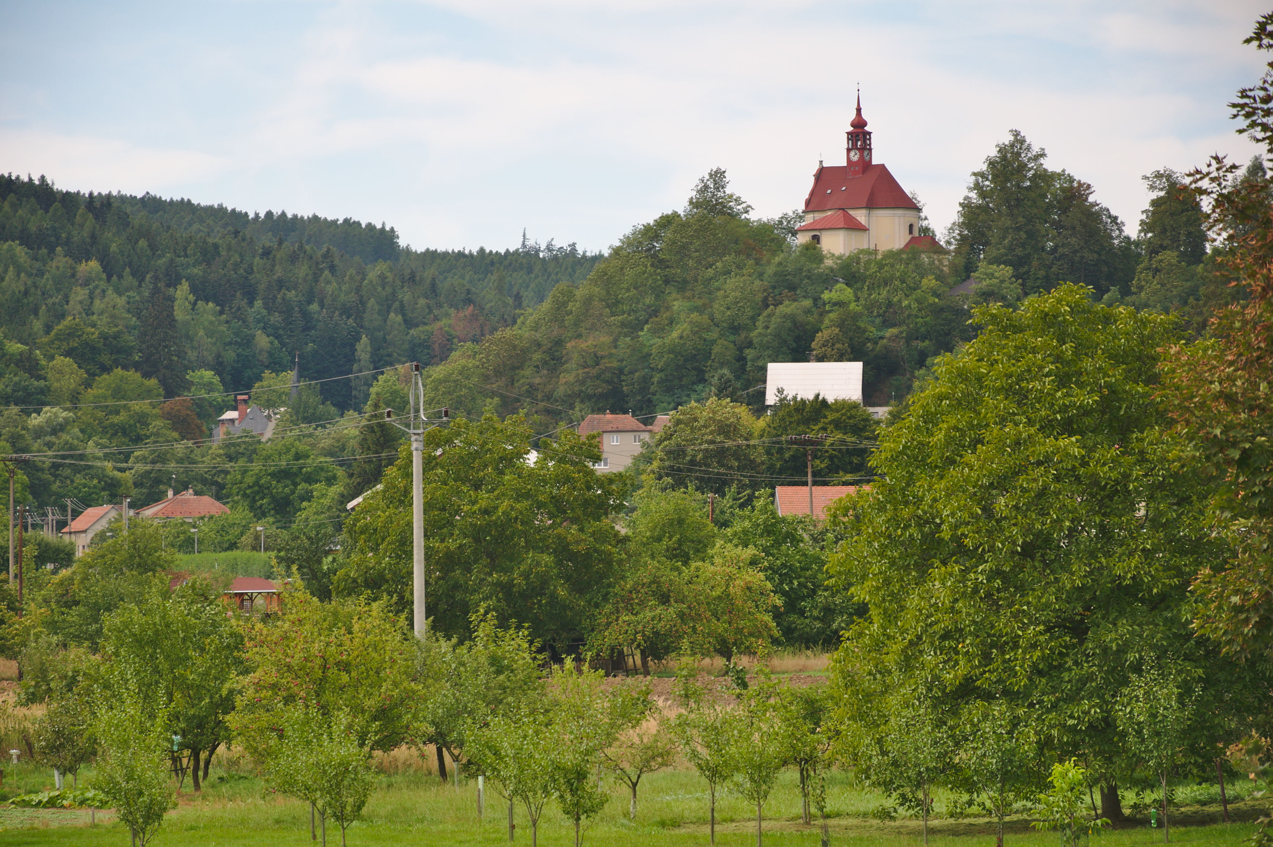 Kostel Andělů Strážných v kontextu obce, Stražisko, okres Prostějov